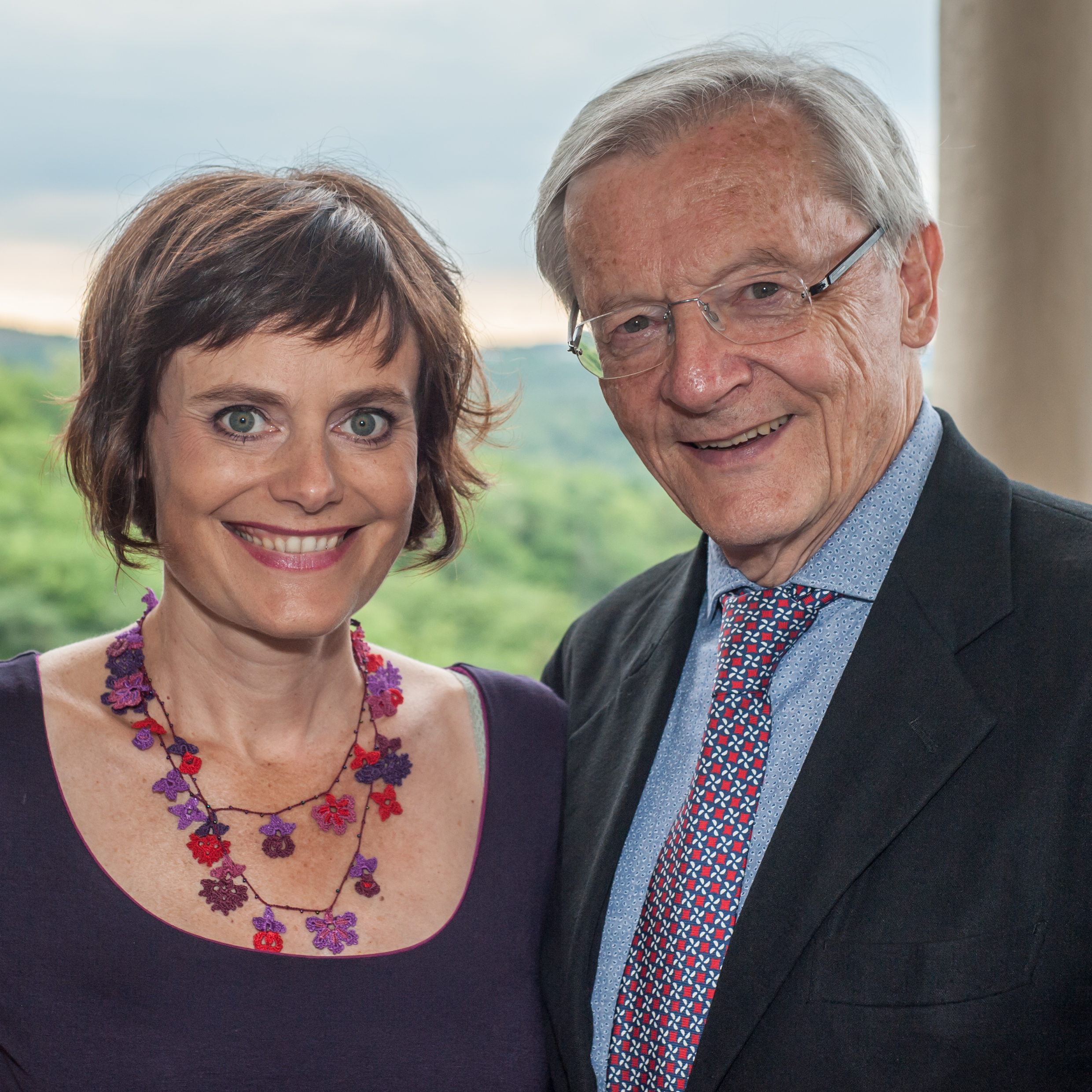 Sommernachtskomödie Rosenburg 2016, Premiere von Kalender Girls am 30. Juni 2016. Bild zeigt Nina Blum und Wolfgang Schüssel.